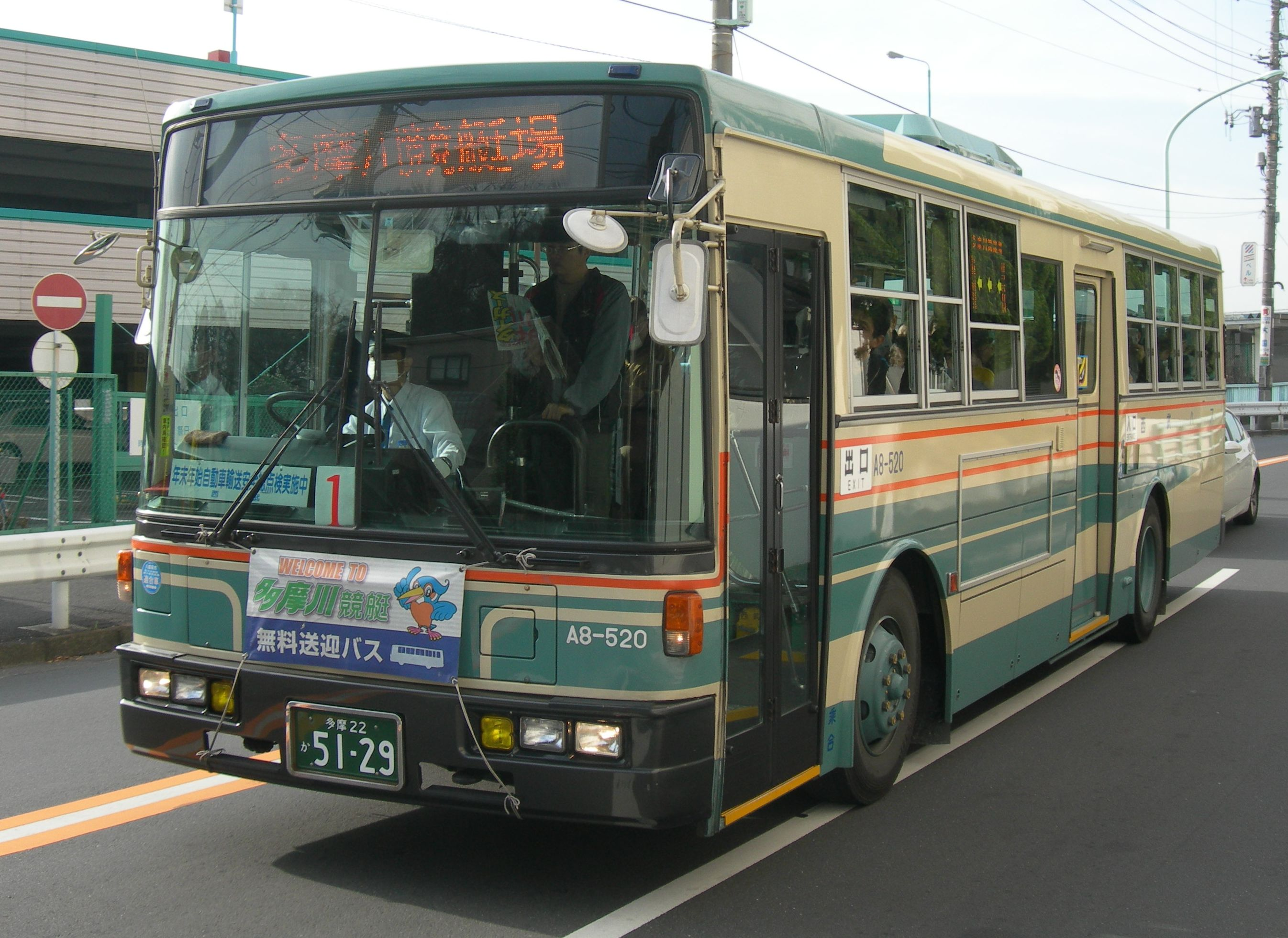 西武バス小平営業所所属車両